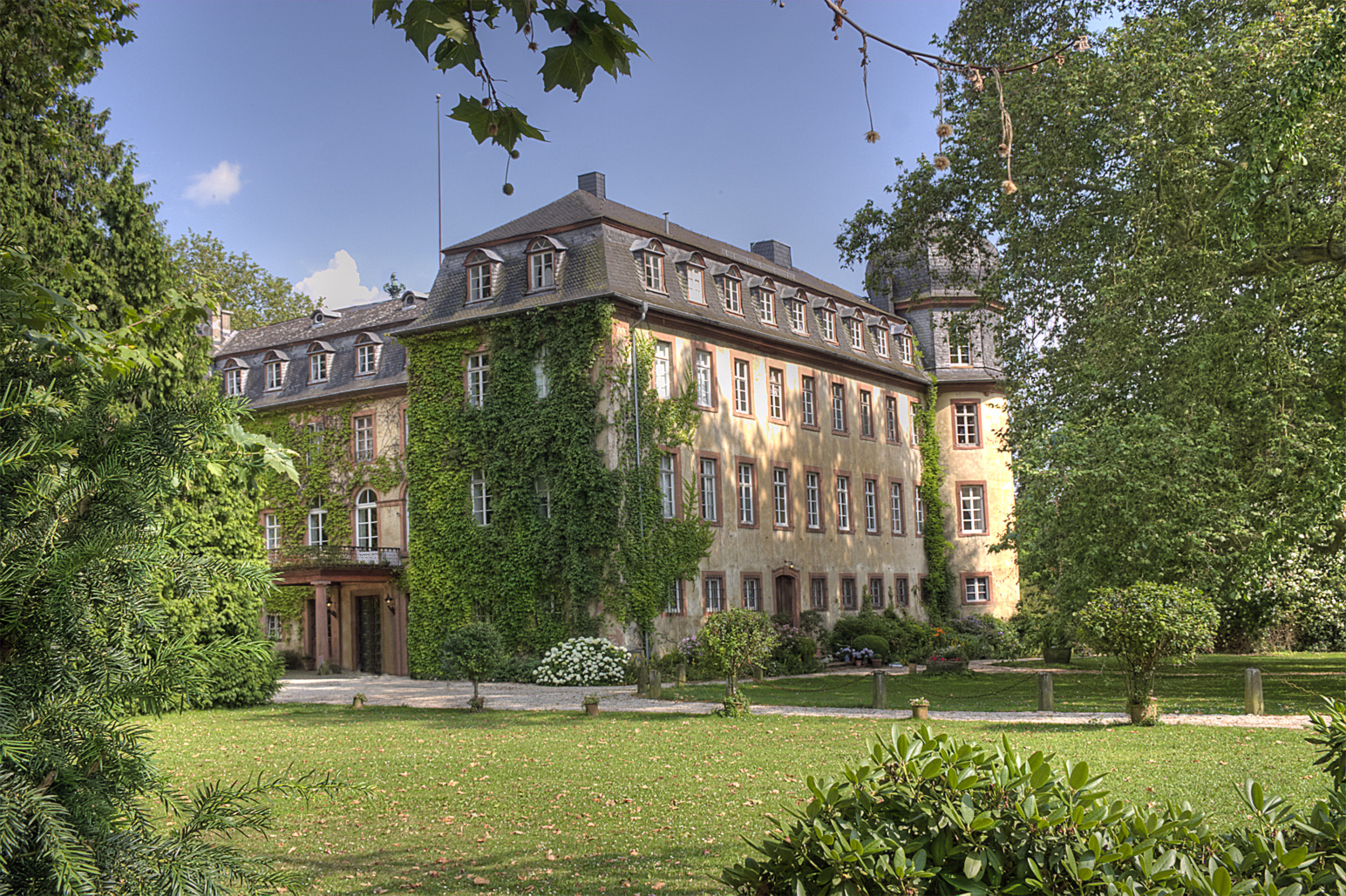 Das Schloss in Lich, Hessen (Deutschland)